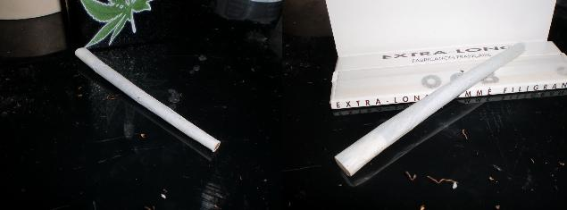 gedrehte Zigarette; 2 Ansichten; + Blättchen/Tapes